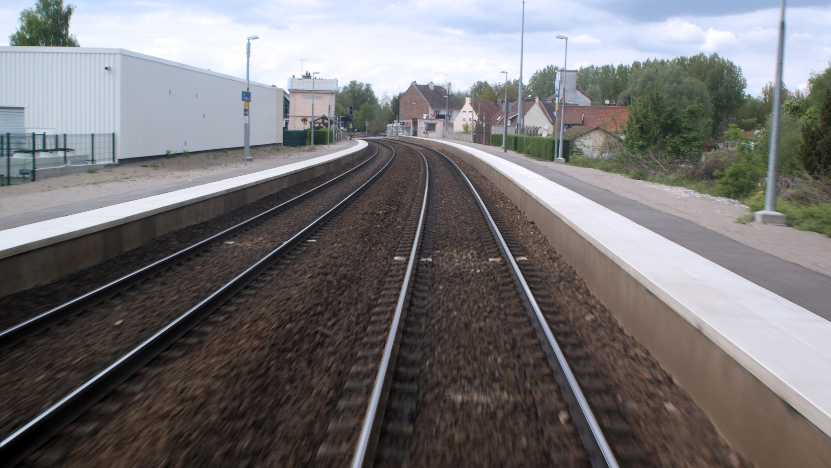 vue côté quaais de la gare